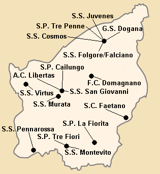 Répartition des clubs du championnat de Saint-marin avant 2000.